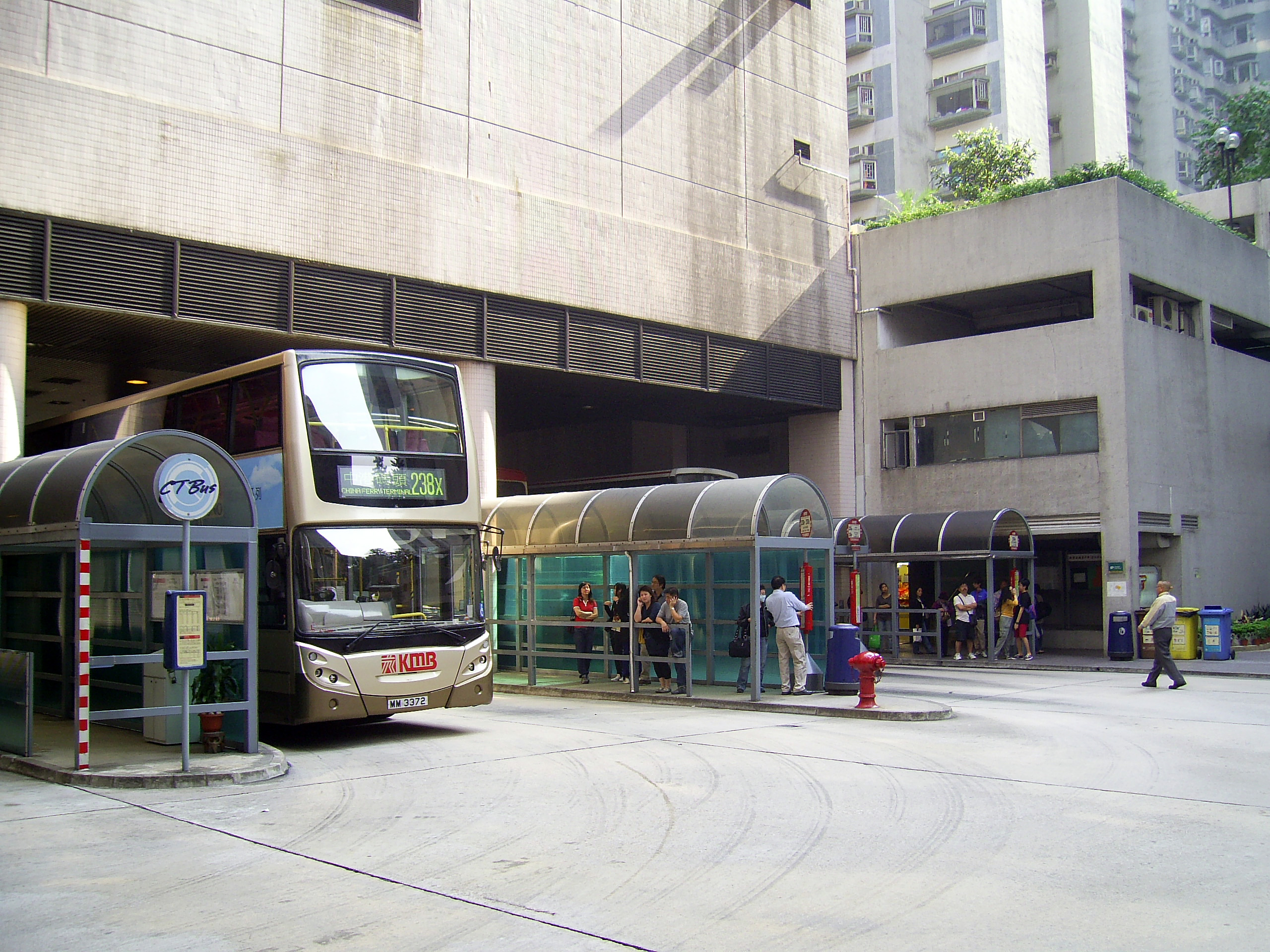 中文（香港）: 海濱花園巴士總站